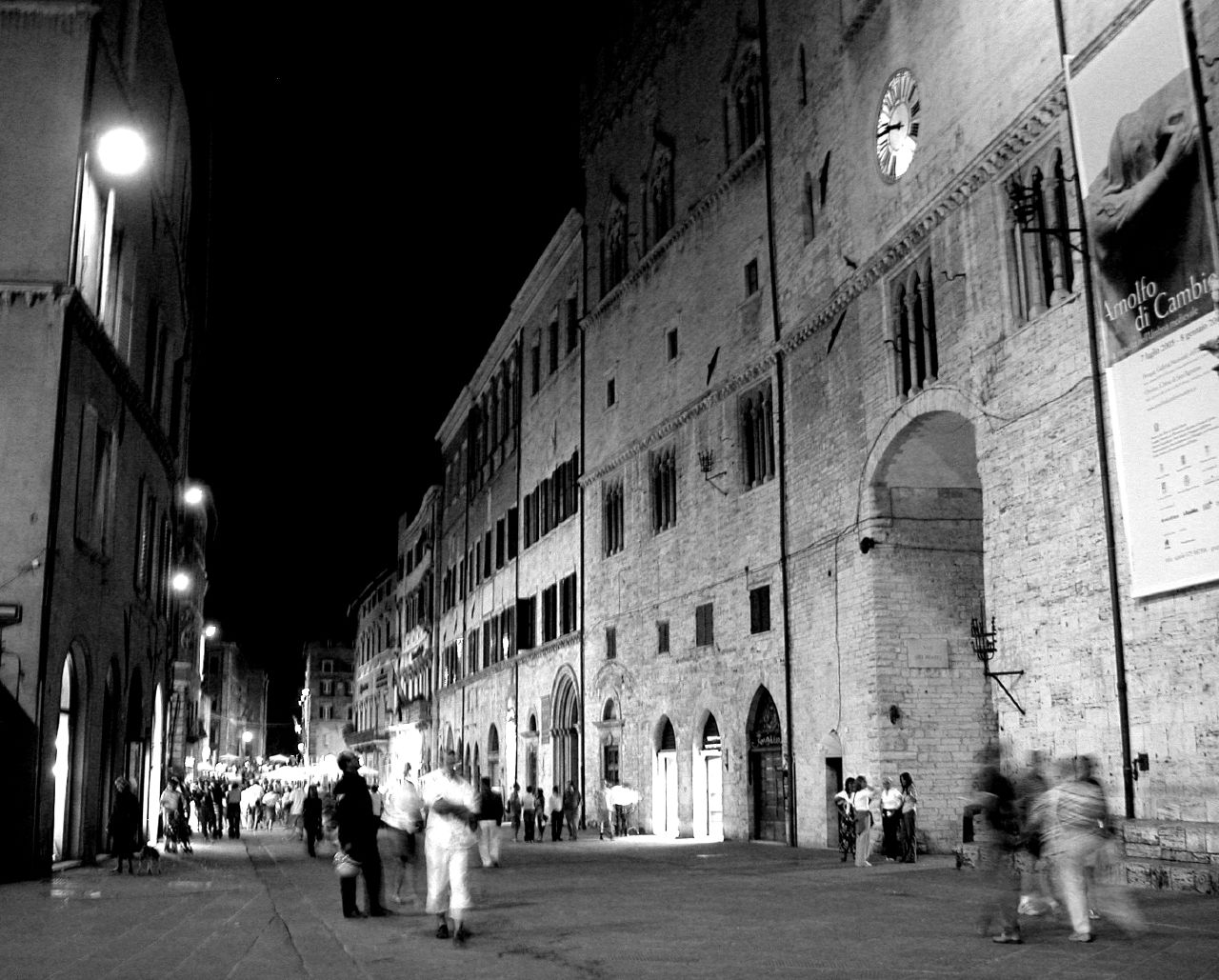 Perugia, passeggio in Corso Vannucci in una serata estiva, foto in bianco e nero